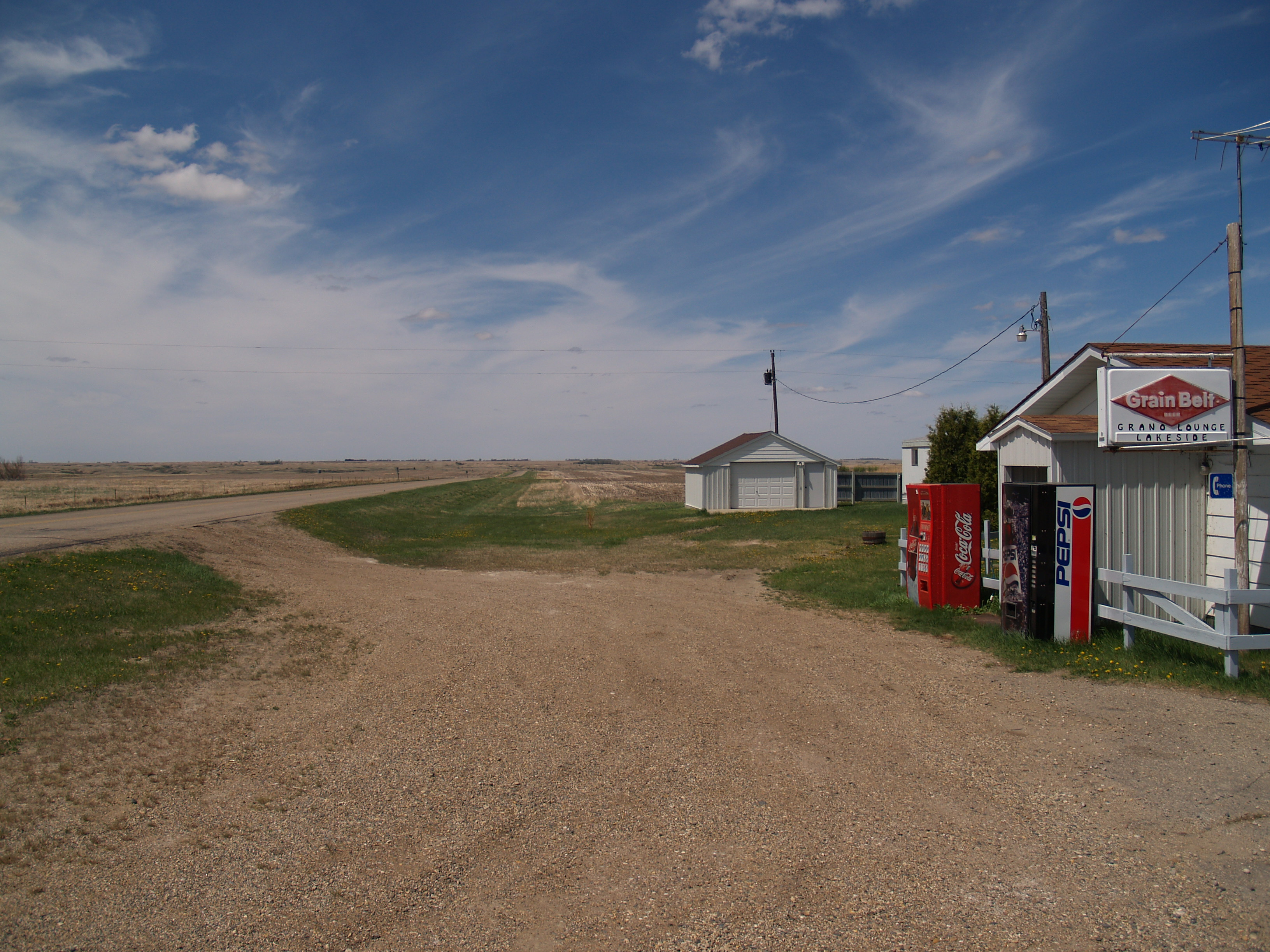 Grano, North Dakota